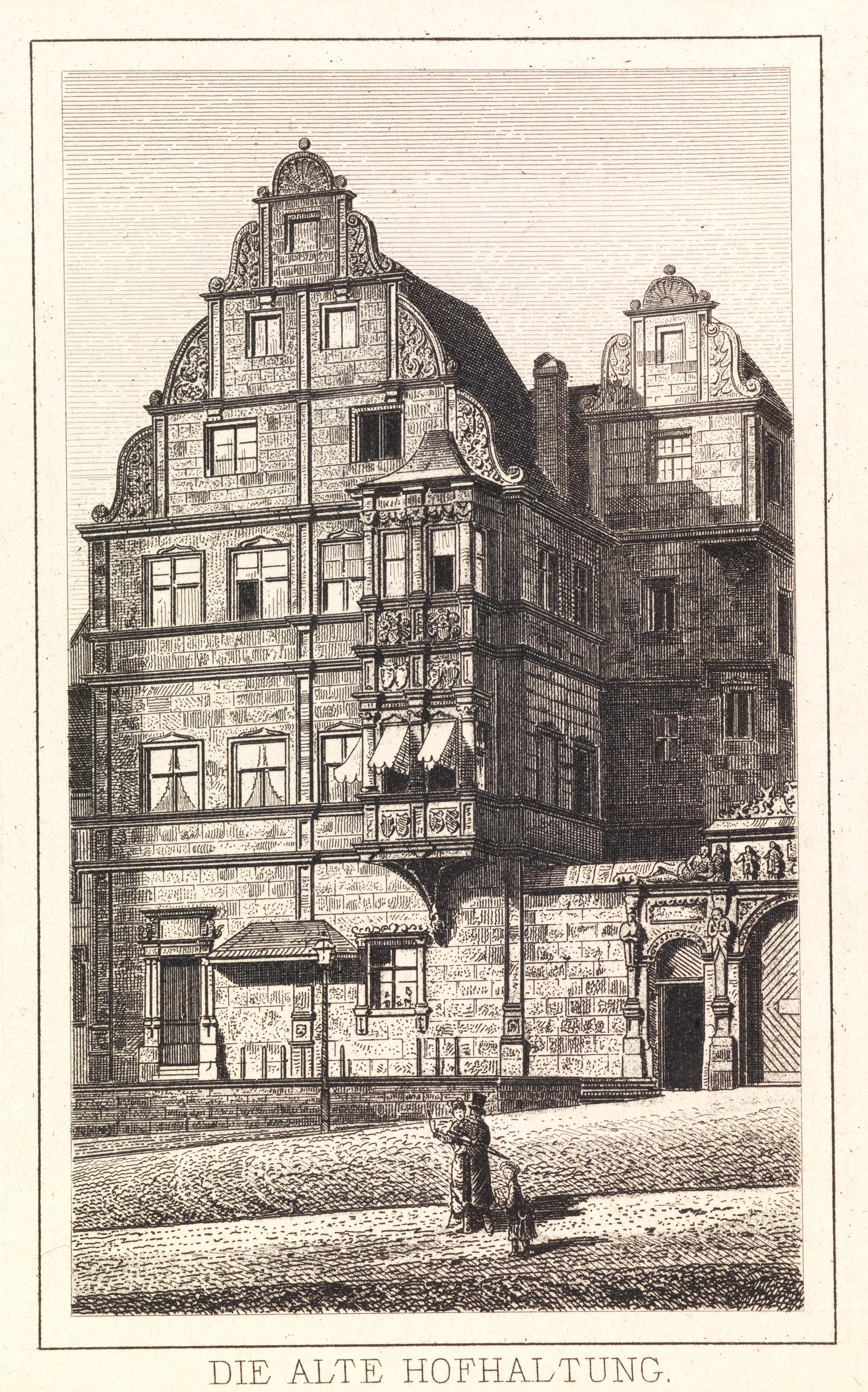 Die Alte Hofhaltung aus Erinnerung an Bamberg. Stich und Druck von Franz Schemm Kunstanstalt Nürnberg. Verlag von Karl Hübscher's Buch- und Kunsthandlung in Bamberg. [ca. 1880].